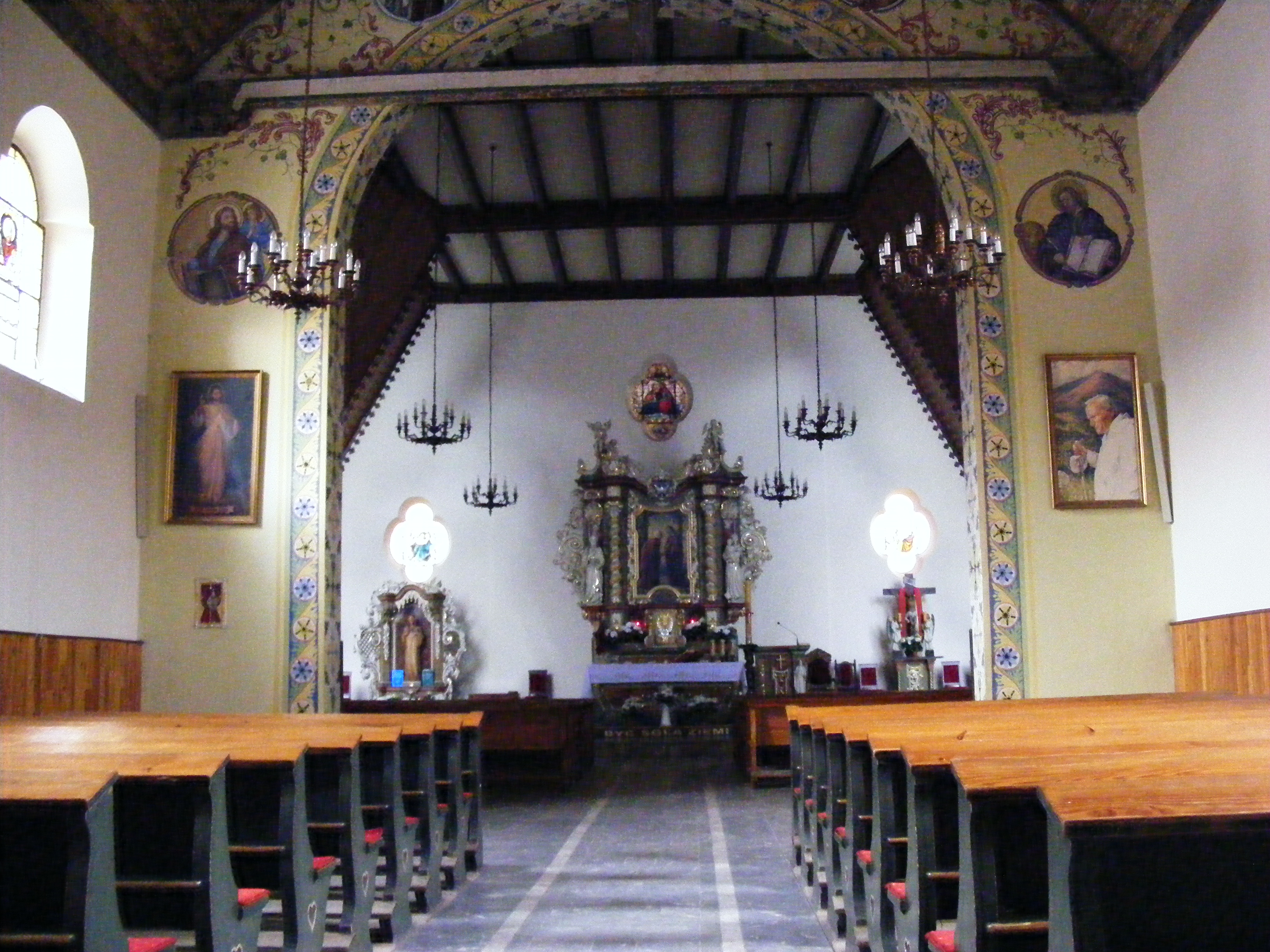 Kościół Nawiedzenia Najświętszej Maryi Panny w Karpaczu.